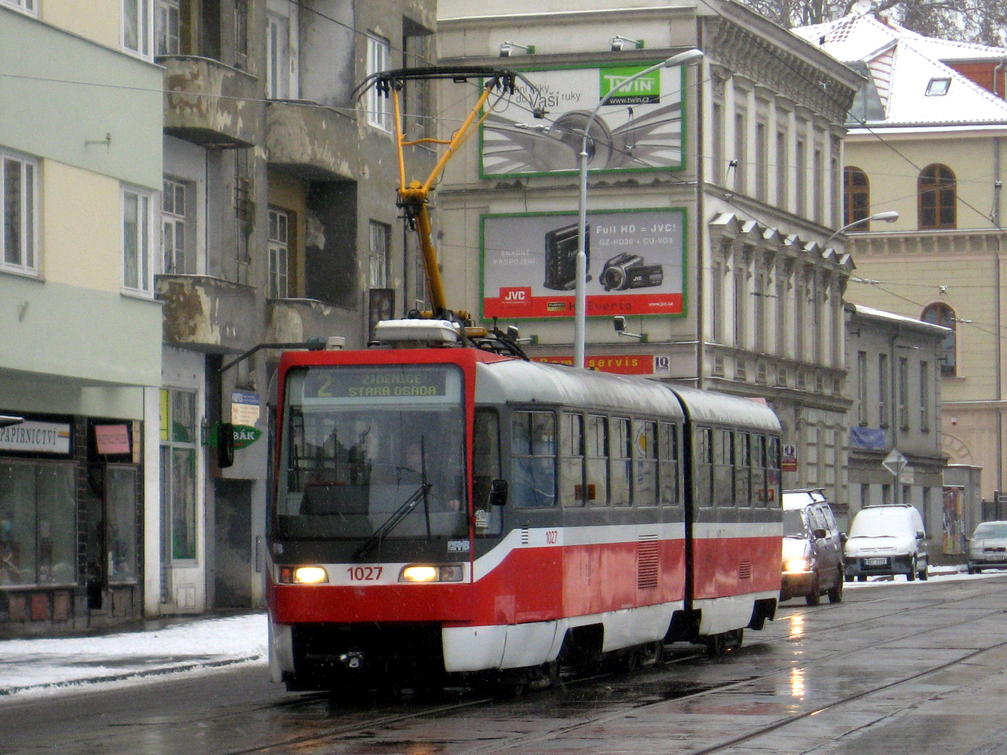 Tatra K2R03 v Brně